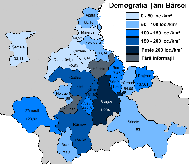 Burzenland demography (2002)